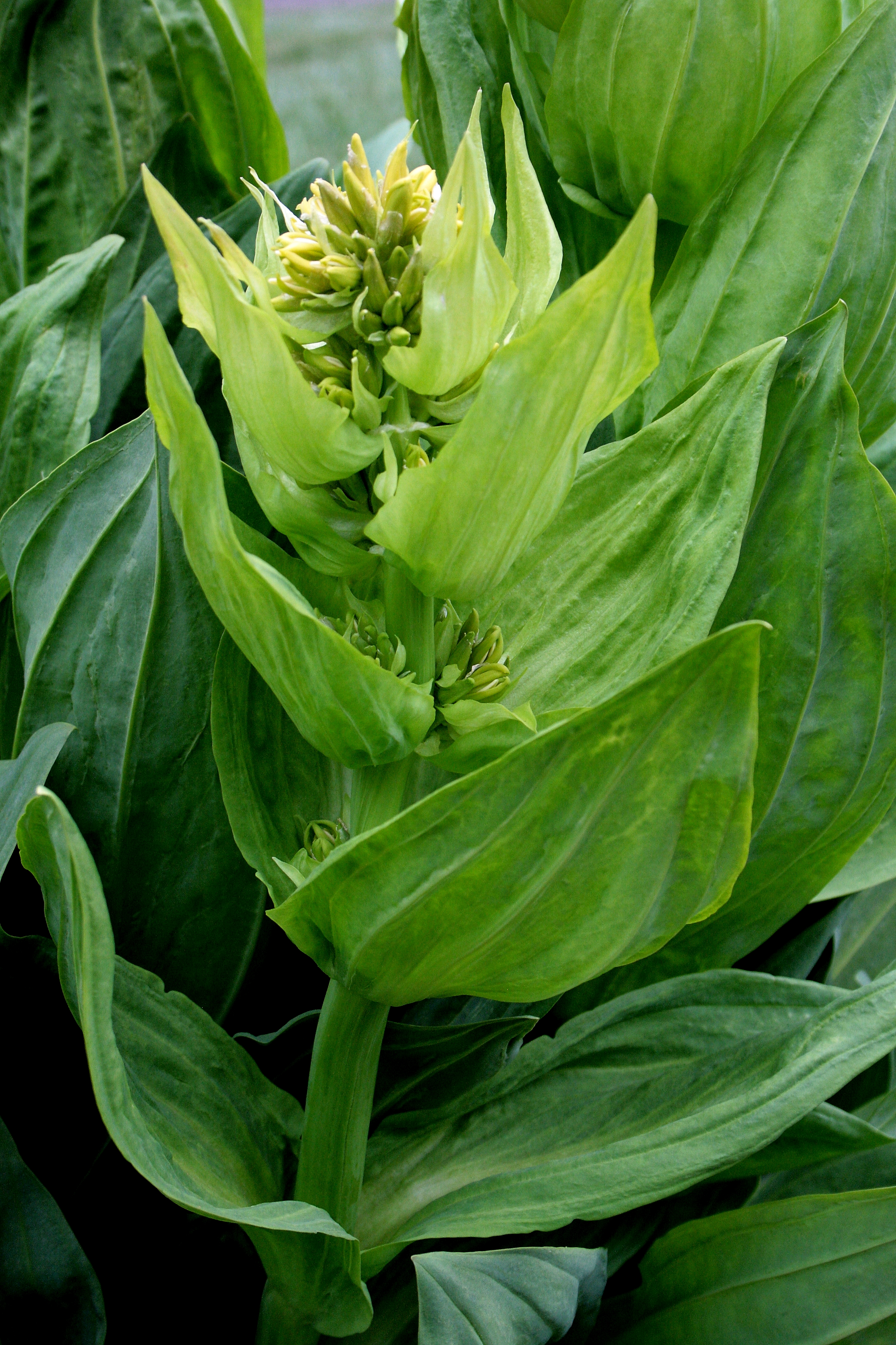 Ísland, Akureyri Botanical Gardens: Gelber_Enzian_(Gentiana_lutea)